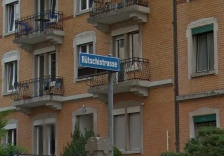 Rütschistr.